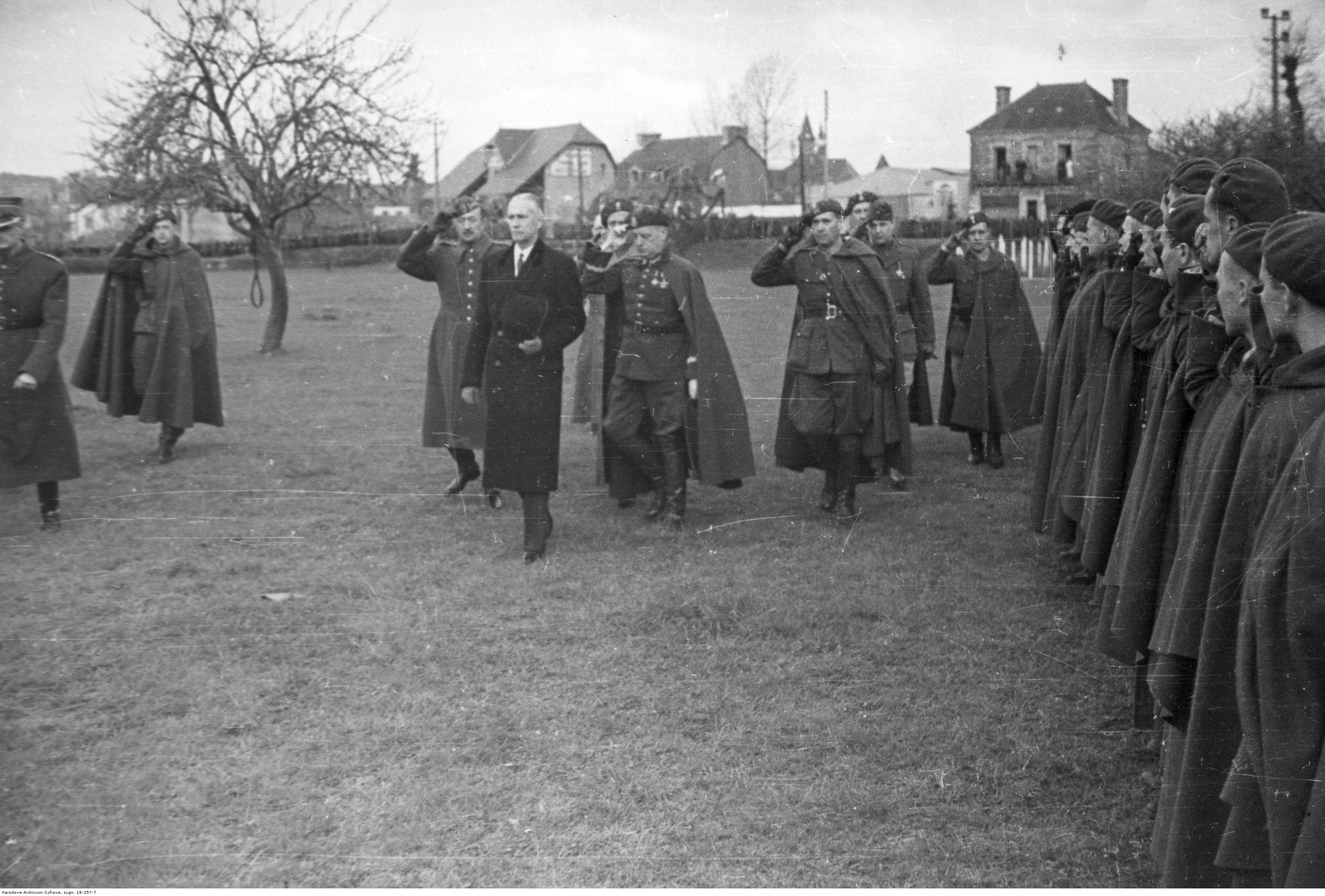 Uroczystość wręczenia sztandaru Samodzielnej Brygadzie Strzelców Podhalańskich. Przegląd pododdziałów Brygady. Od lewej: NN, NN, płk. F. Arciszewski, prezydent RP Władysław Raczkiewicz, gen. Władysław Sikorski, płk. Zygmunt Bohusz-Szyszko, płk. dypl. Aleksander Kędzior. Archiwum Fotograficzne Czesława Datki. Sygnatura: 18-257-7